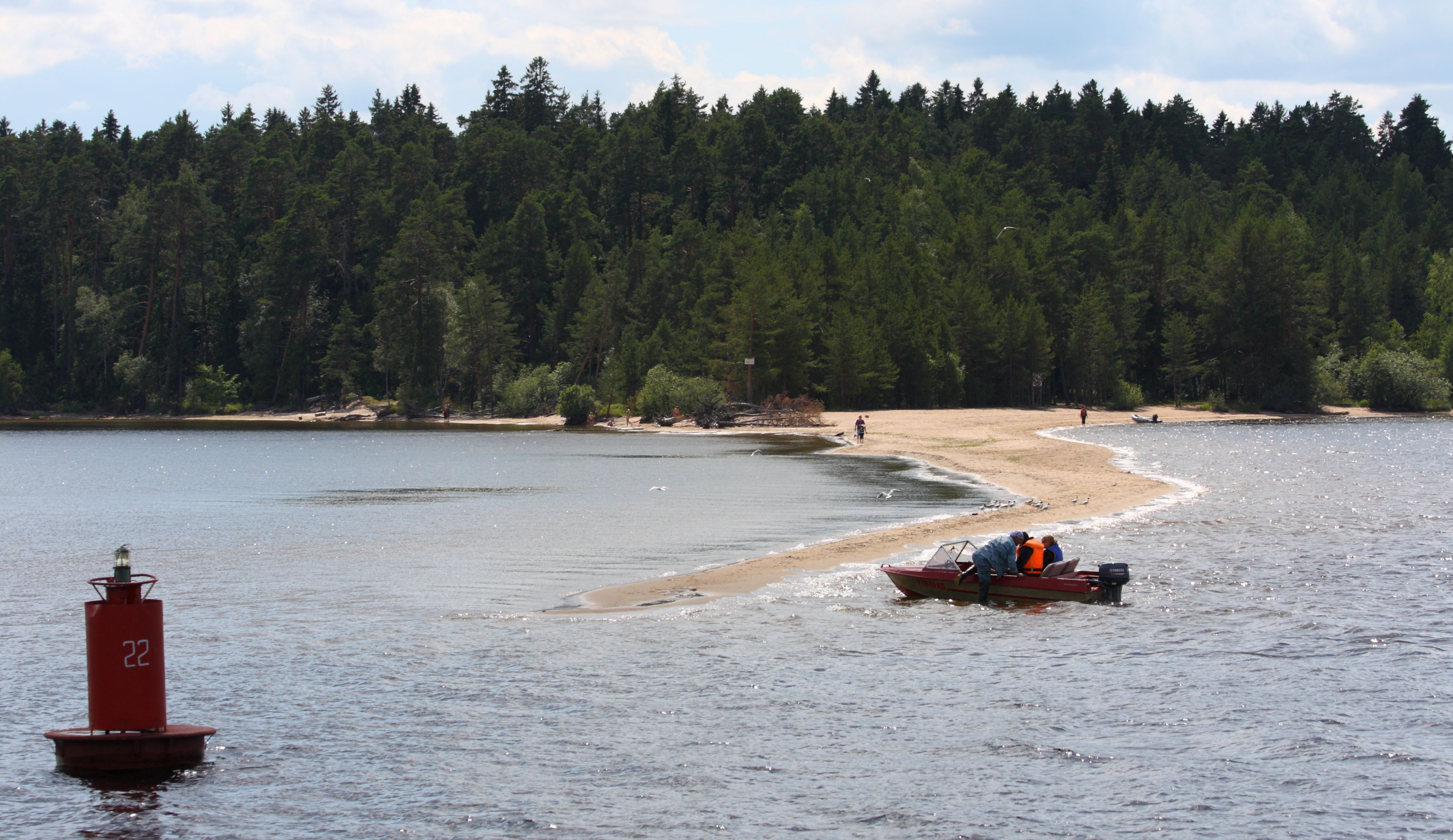 Майская коса (оз. Селигер, о. Городомля